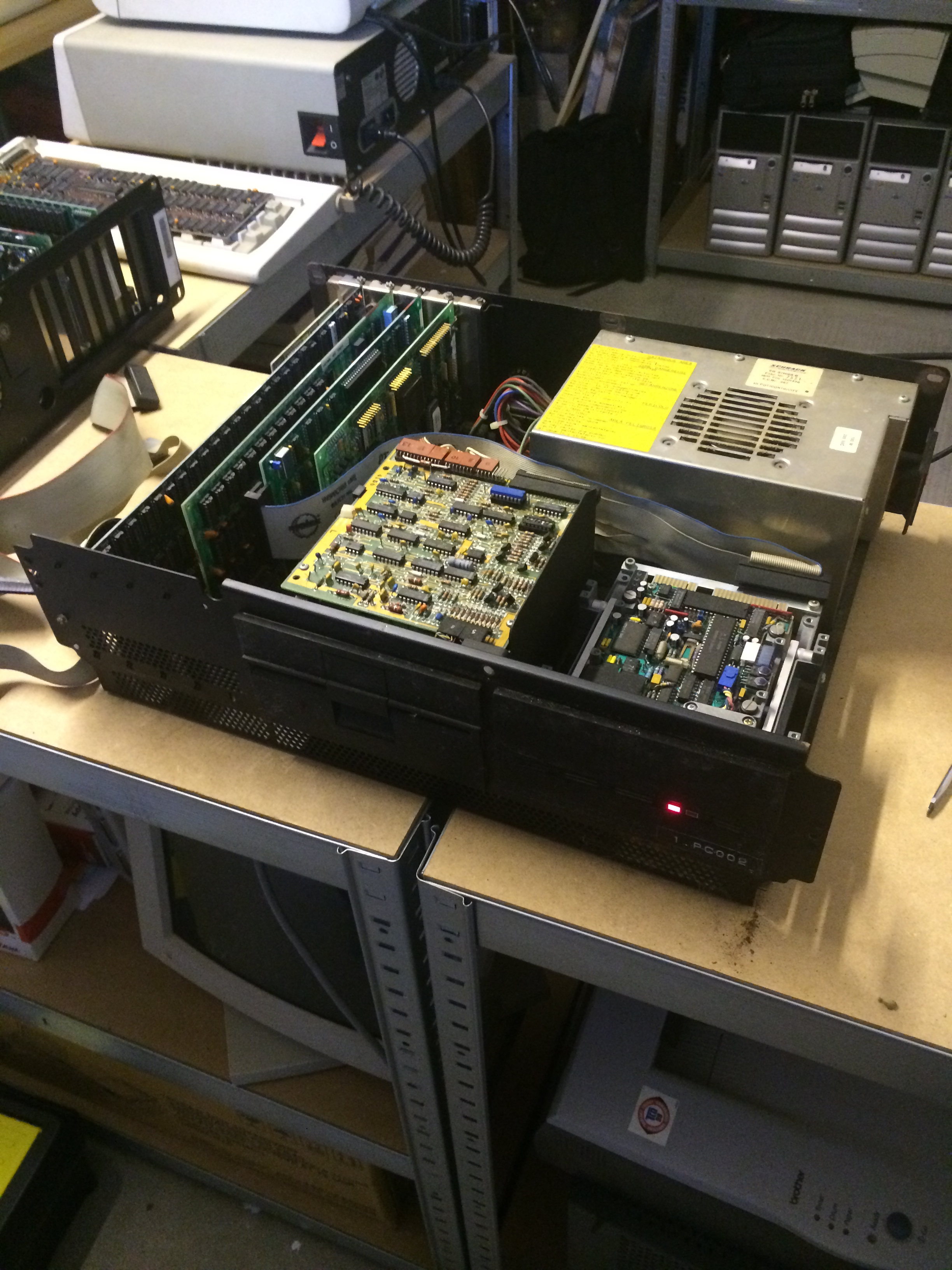 Opengeschroefte IBM 5160 XT